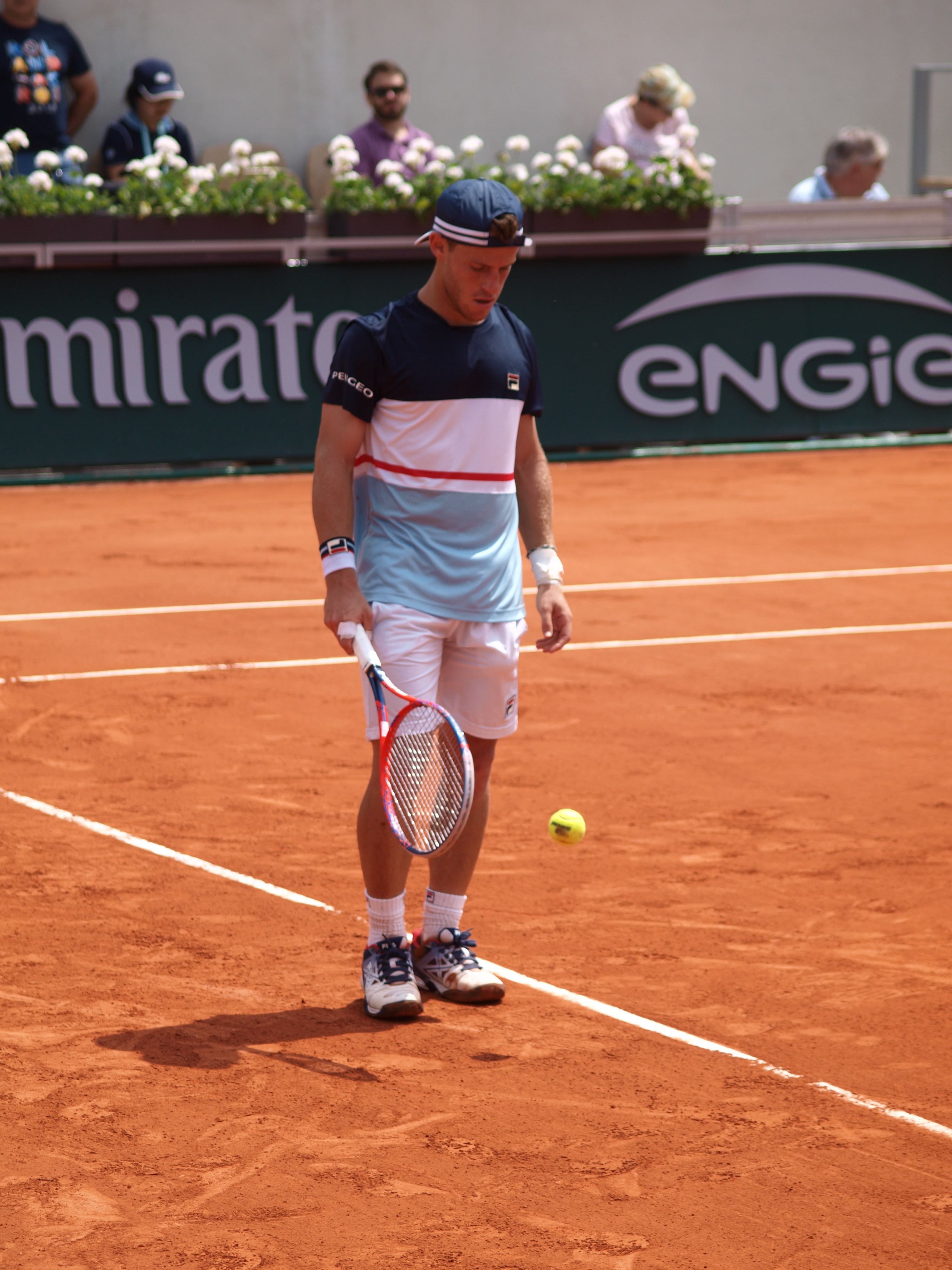 Diego Schwartzman sur le cours Suzanne Lenglen (stade Roland Garros de Paris) le 4 juin 2018, durant son match contre Kevin Anderson